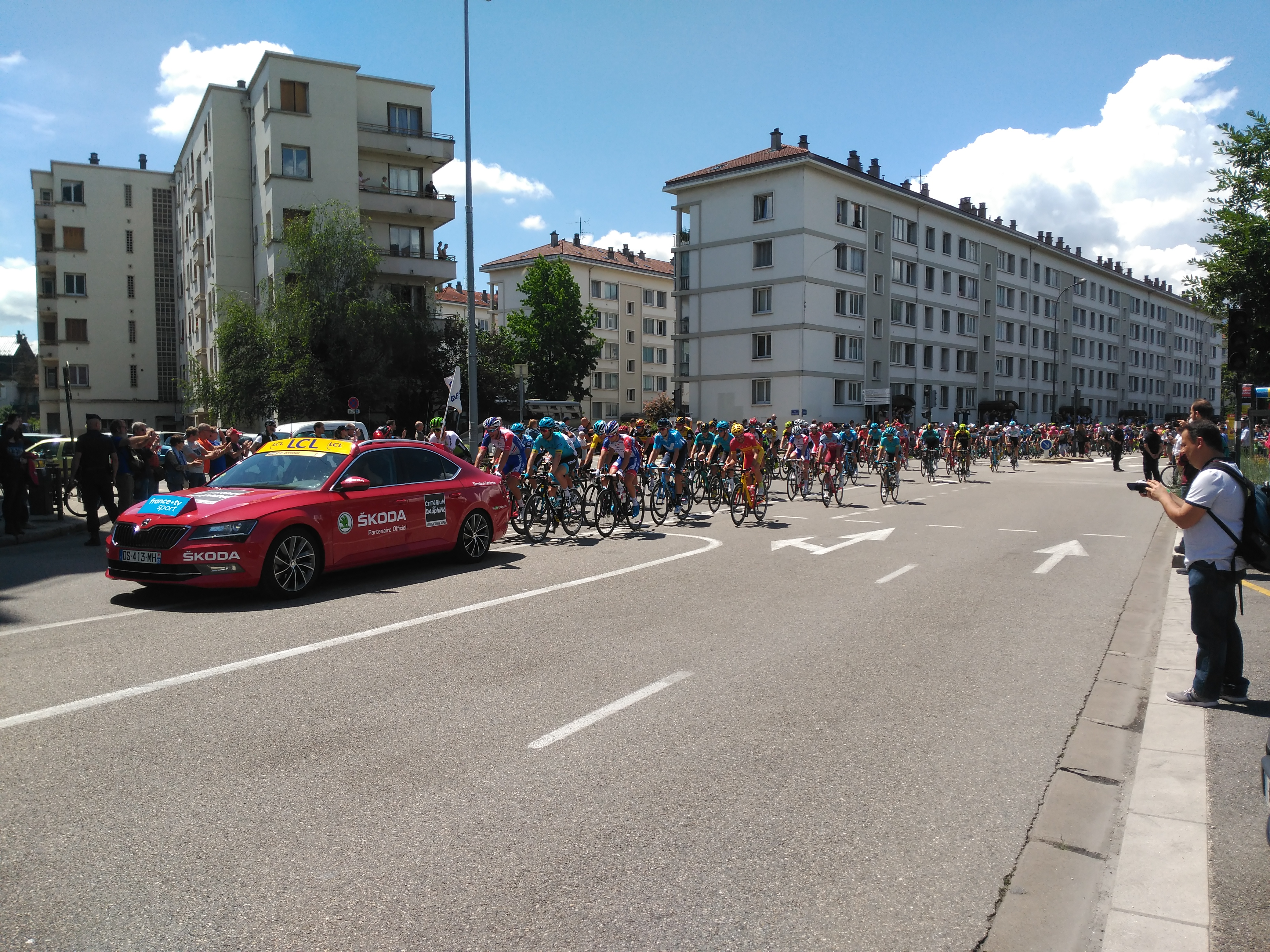 Critérium du Dauphiné 2018, étape 5 (départ) sur le boulevard Clémenceau de Grenoble.